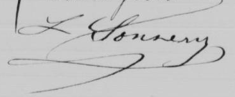 Signature de Louis Sonnery